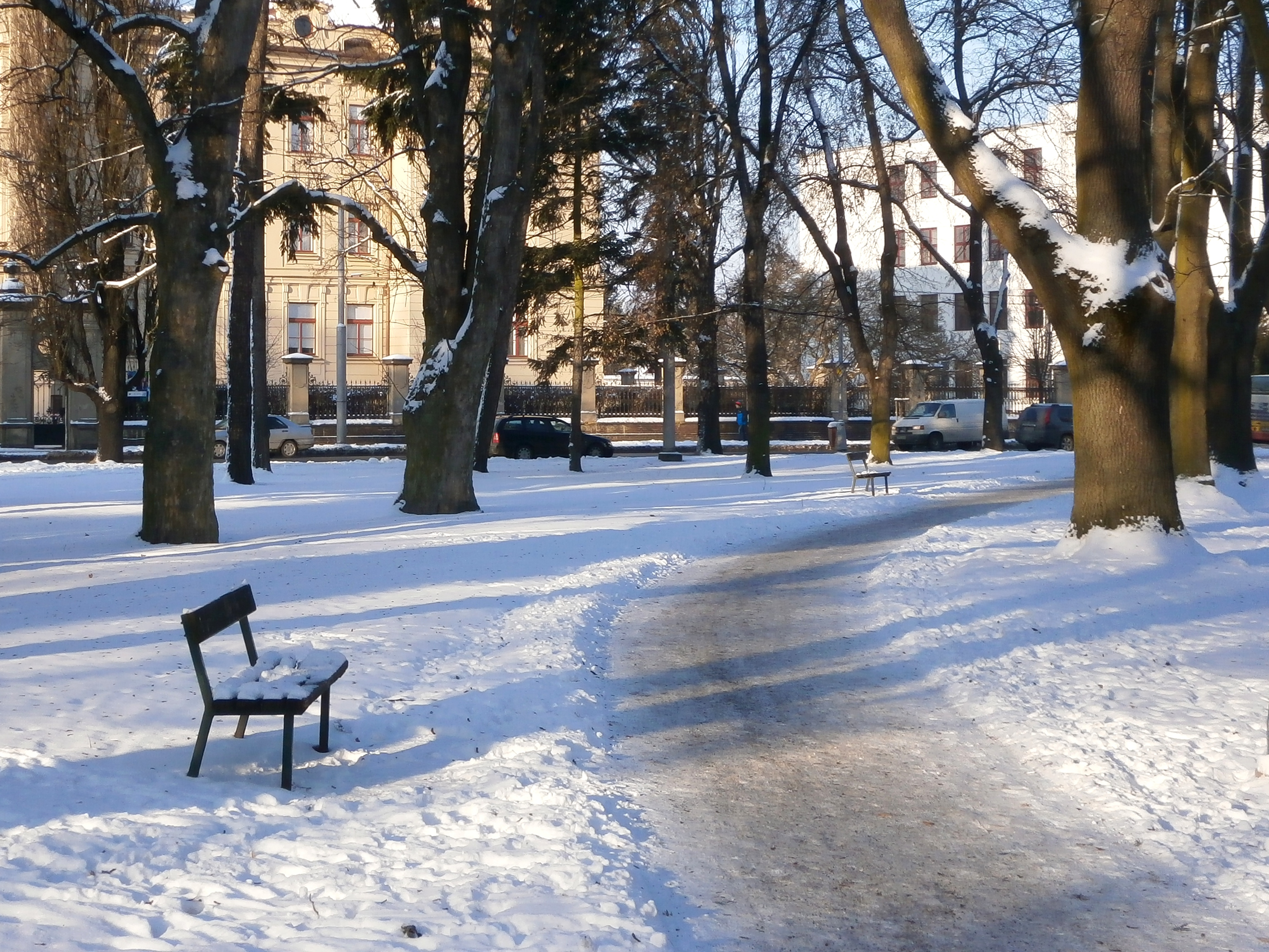 Kubištovy sady v Hradci Králové